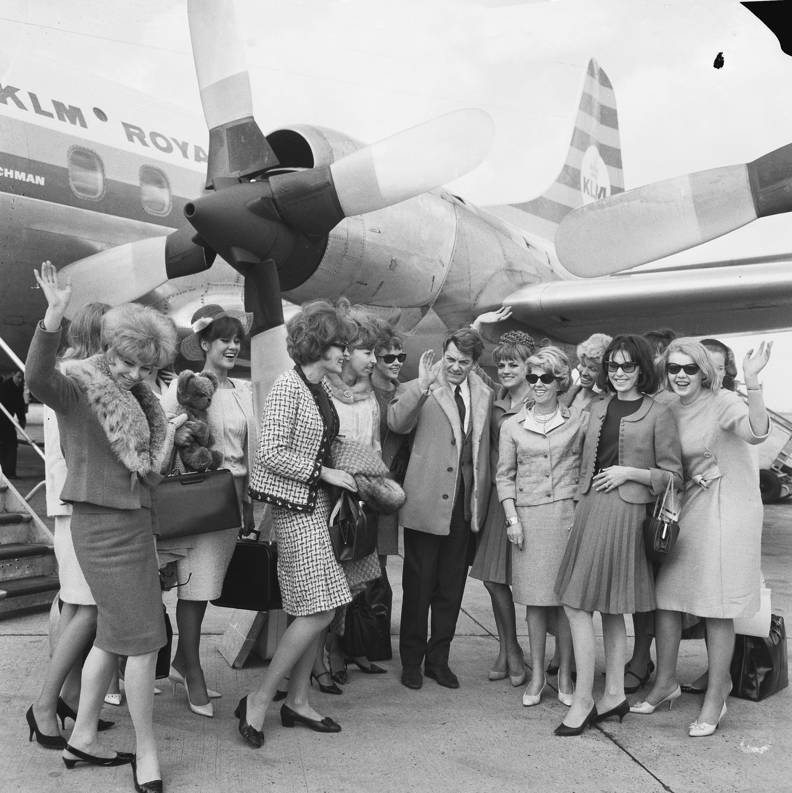 Collectie / Archief : Fotocollectie Anefo Reportage / Serie : [ onbekend ] Beschrijving : Aankomst Blue Bell Girls op Schiphol, Jean Marais te midden van de Blue Bell Girls Datum : 13 april 1965 Locatie : Noord-Holland, Schiphol Trefwoorden : aankomsten, acteurs, filmsterren, showgirls, toneelspelers, vliegvelden Persoonsnaam : Blue Bell Girls, Jean Marais Fotograaf : Nijs, Jac. de / Anefo Auteursrechthebbende : Nationaal Archief Materiaalsoort : Negatief (zwart/wit) Nummer archiefinventaris : bekijk toegang 2.24.01.03 Bestanddeelnummer : 917-6469